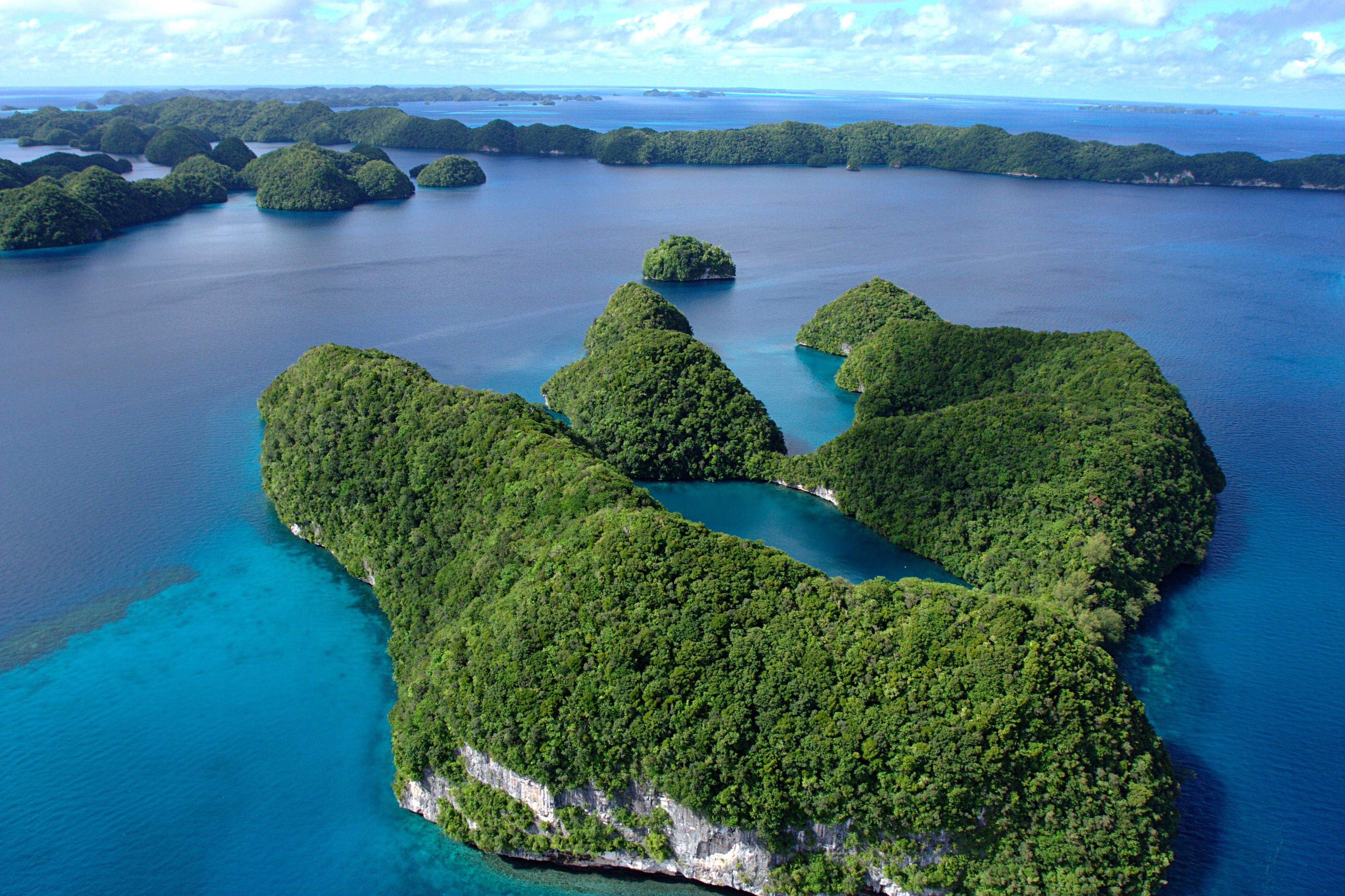 Removed haze.